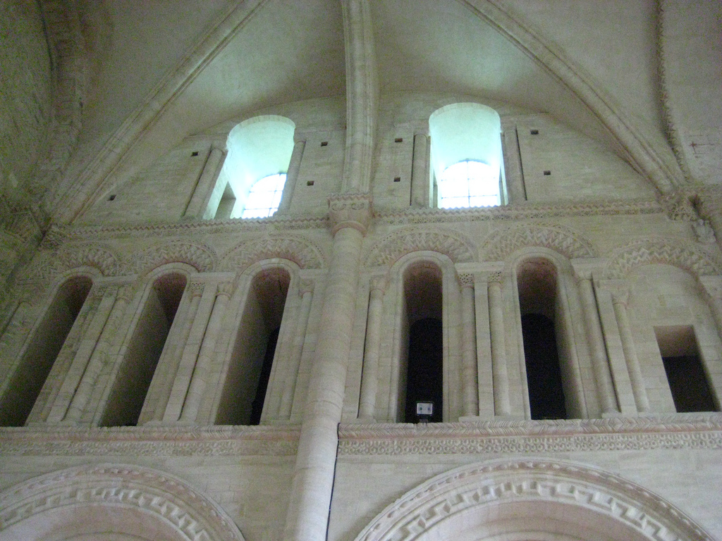 chœur de l'église du prieuré Saint-Gabriel à Saint-Gabriel-Brécy dans le Calvados (Basse-Normandie, France).